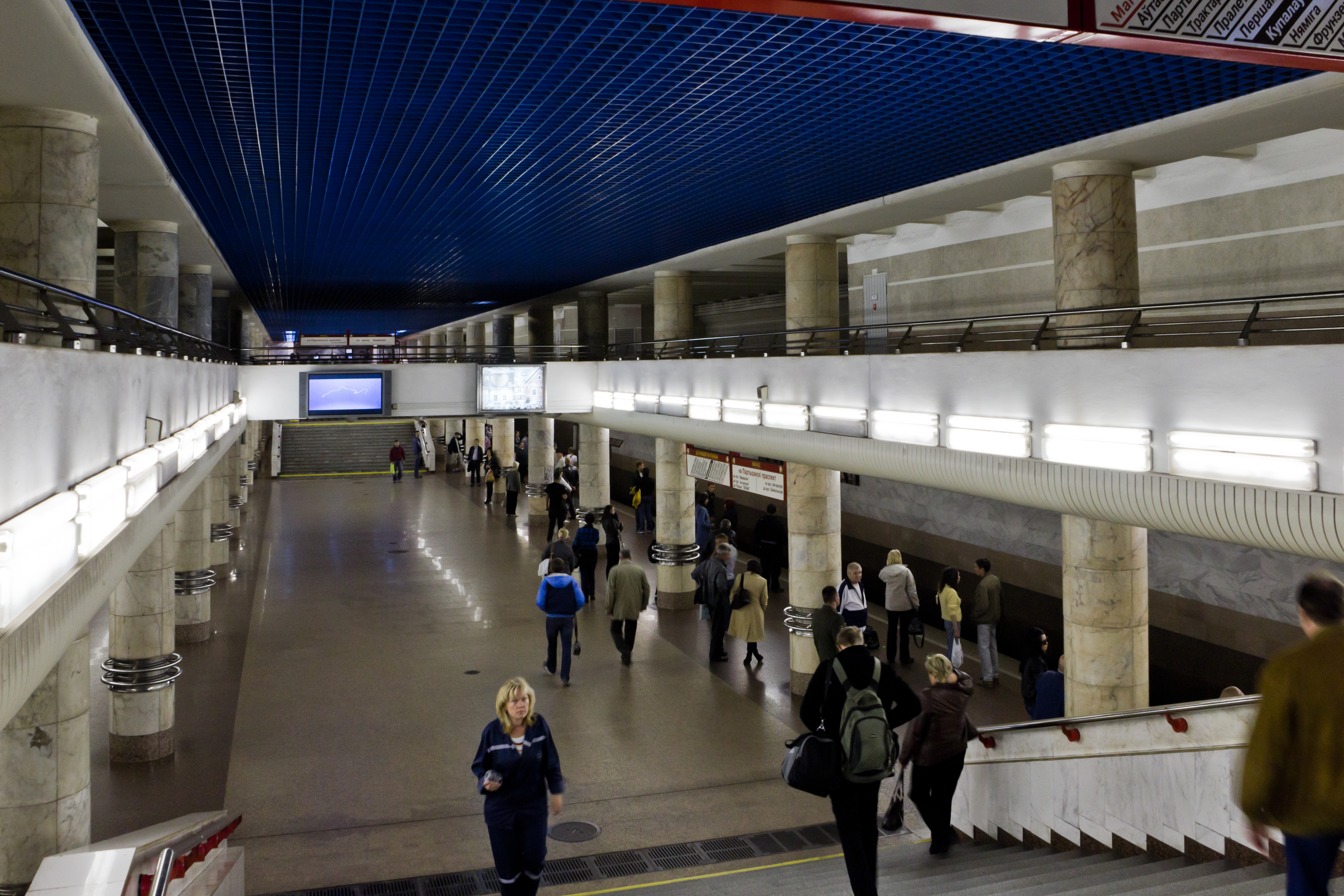 Станция метро «Могилёвская», Минск